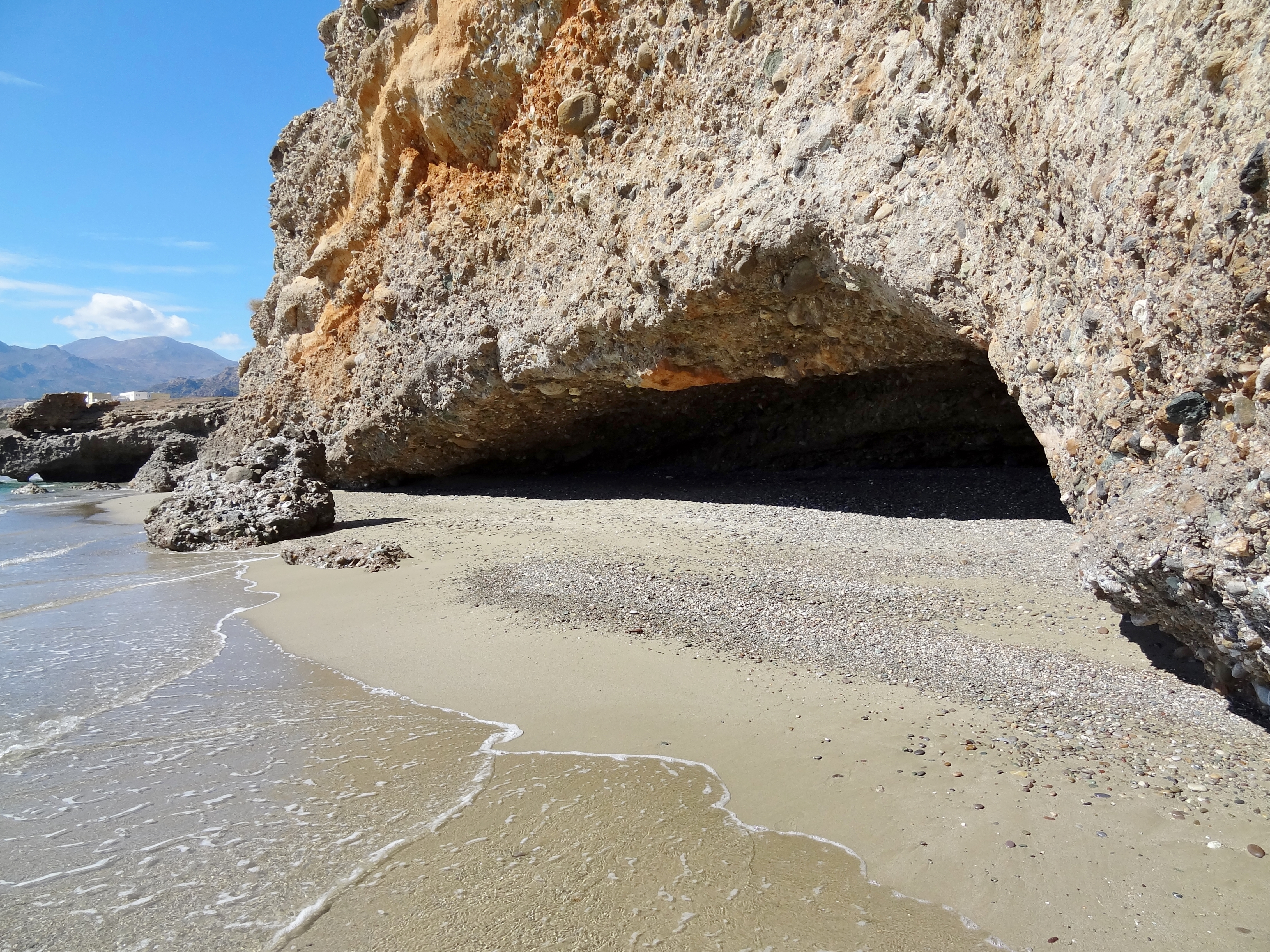 Karavospilios (Καραβόσπηλιος ‚Schiffshöhle‘) am Strand von Diaskari (Παραλία Διασκάρι), Gemeinde Sitia, Kreta, Griechenland